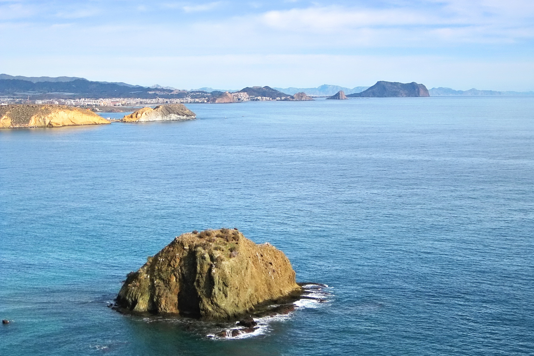 Isla Negra